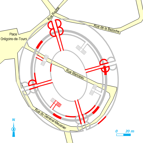 Vestiges de l'amphithéâtre (en rouge) reportés sur son tracé supposé (en noir) et dans le plan de la ville moderne (en gris).